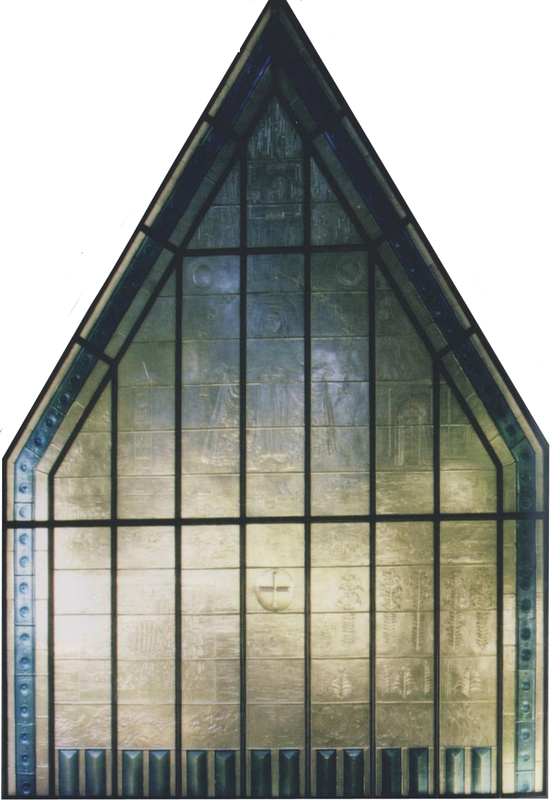 Giebelseite der Kapelle in Tretting, Gemeinde Arnschwang